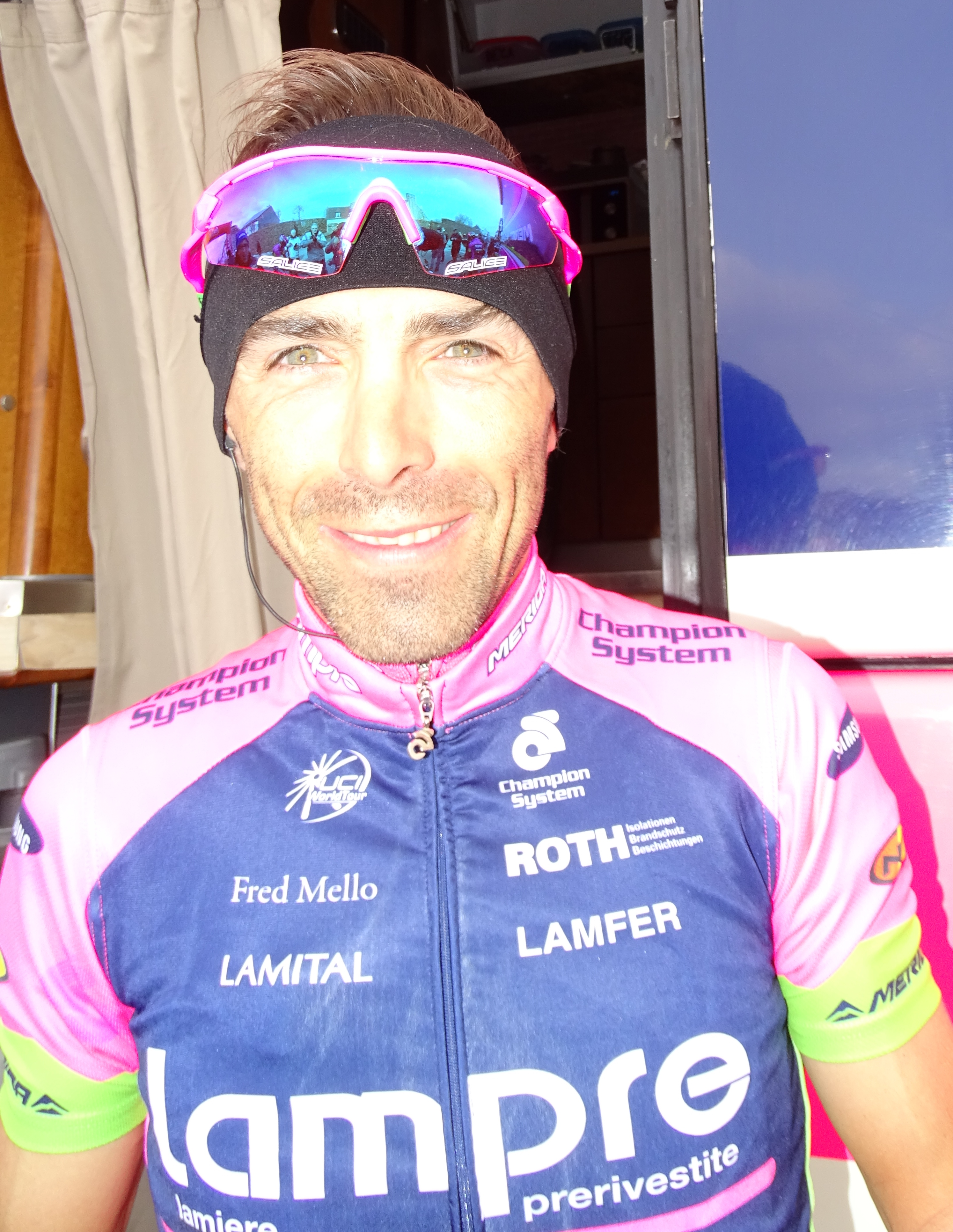 Reportage réalisé le vendredi 27 mars à l'occasion du départ et de l'arrivée du Grand Prix E3 2015 à Harelbeke, Belgique.